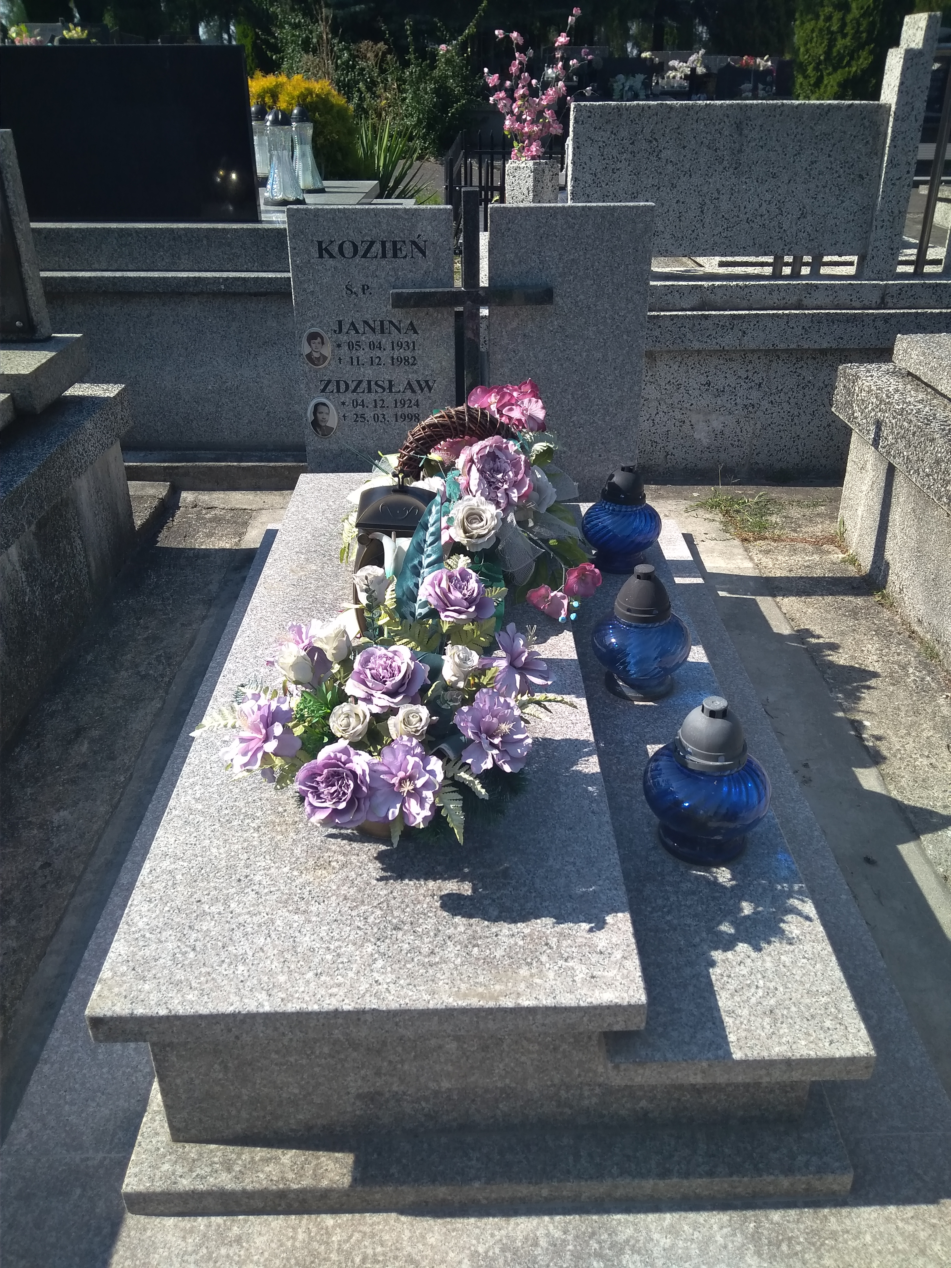 Grób Zdzisława Kozienia na Cmentarzu Wilkowyja w Rzeszowie (sektor 38, rząd 10, grób nr 2)